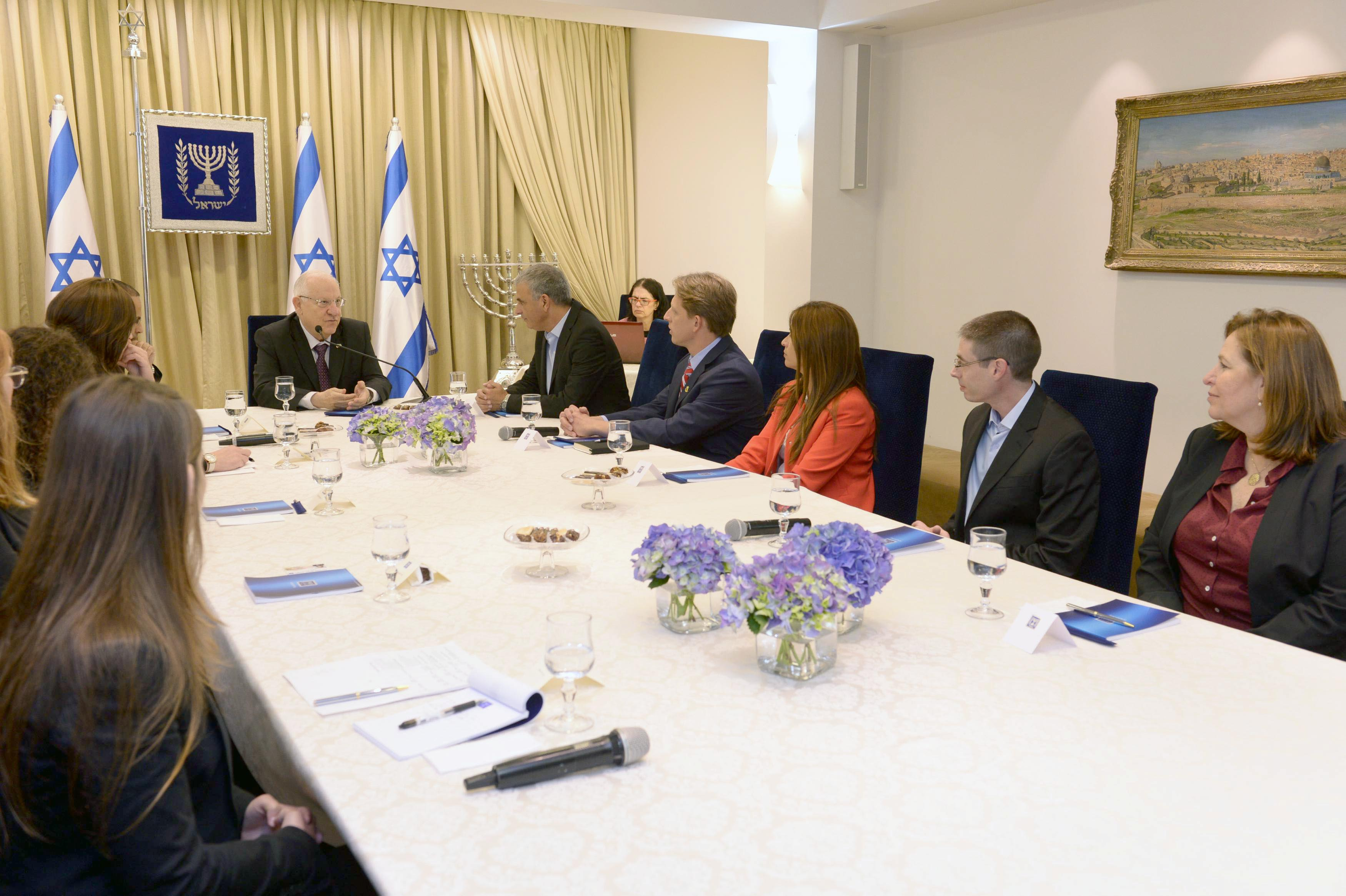 נשיא מדינת ישראל ראובן ריבלין פותח בהתייעצויות עם המפלגות השונות לקראת הרכבת הממשלה לאחר בחירות מרץ 2015 עם כולנו